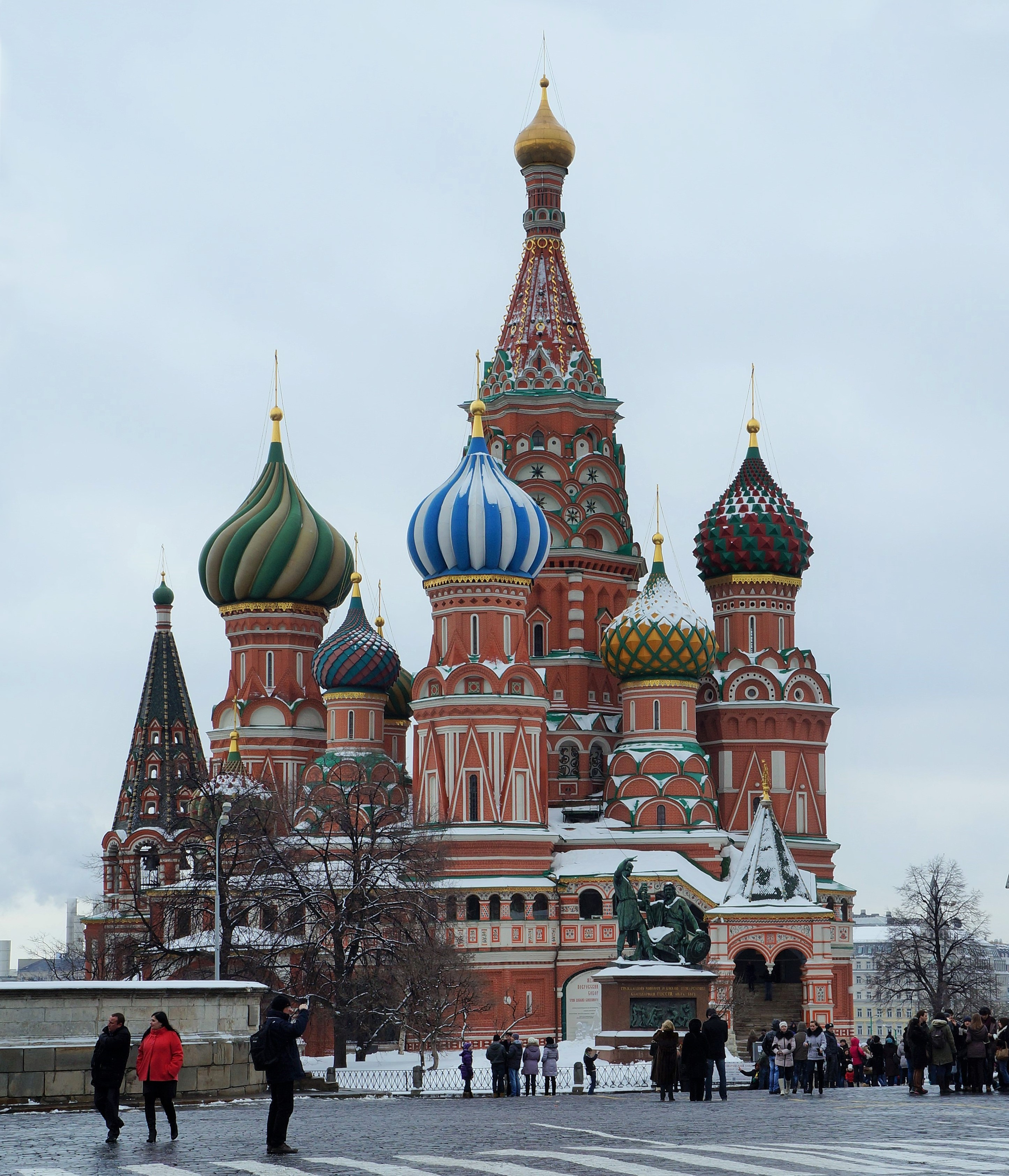 Cathédrale Saint-Basile-le-Bienheureux de Moscou.-Russie